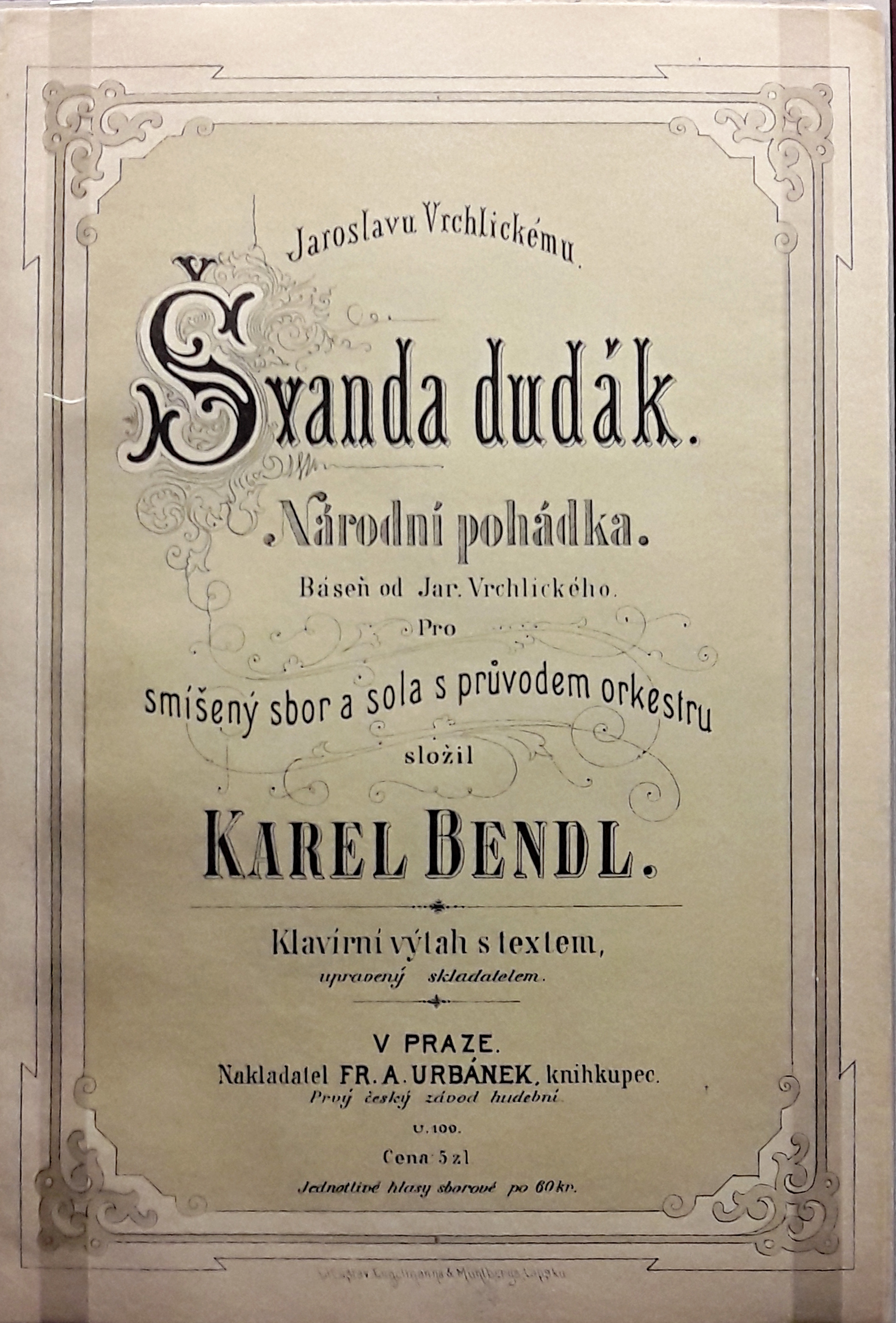 Karel Bendl, Švanda dudák – kantáta pro sóla, smíšený sbor a orchestr na text Jaroslava Vrchlického, (klavírní výtah) vyd. 1883. České muzeum hudby